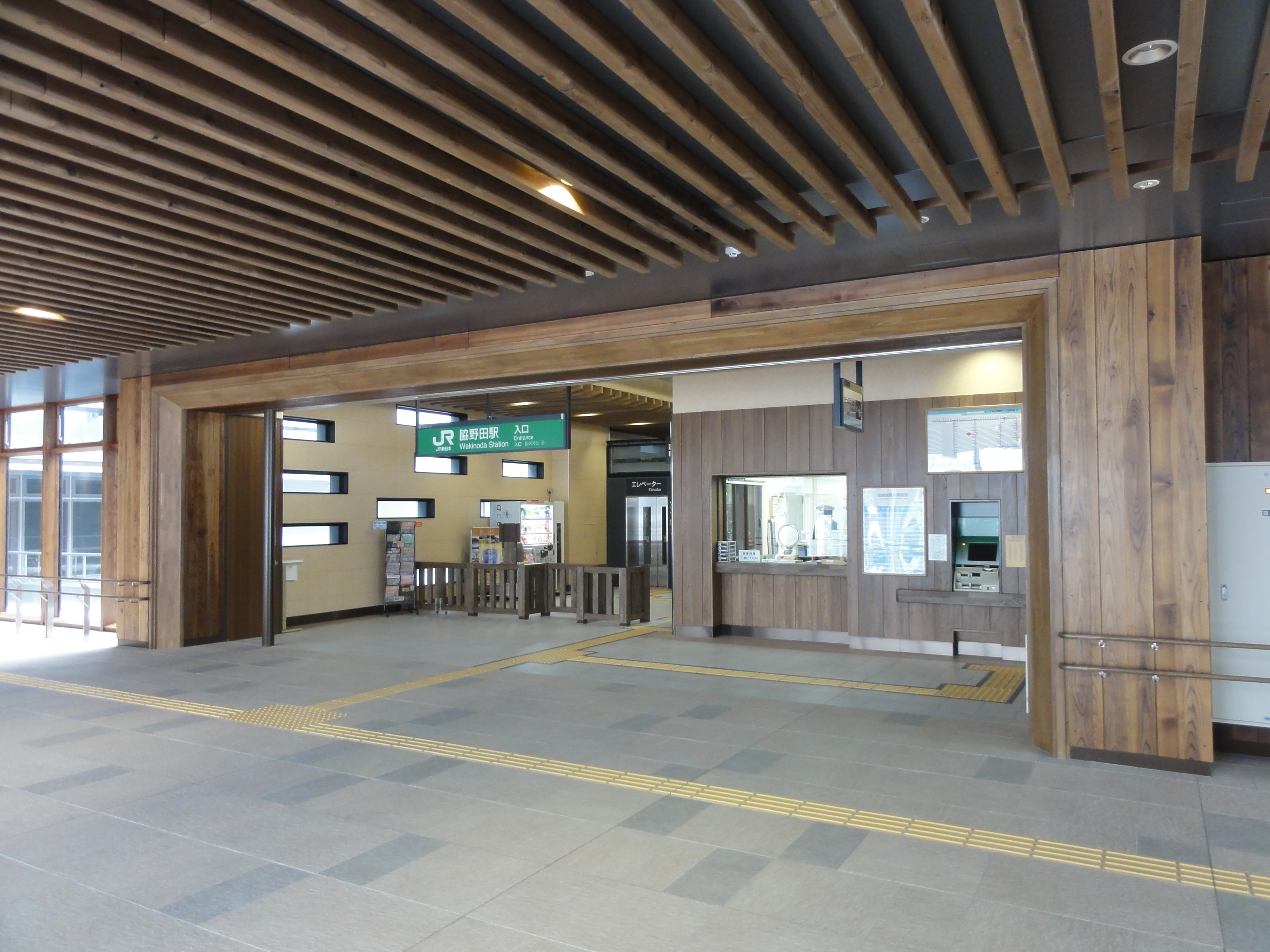 信越本線・脇野田駅改札口 （※2015年3月14日からはえちごトキめき鉄道上越妙高駅改札口となる）